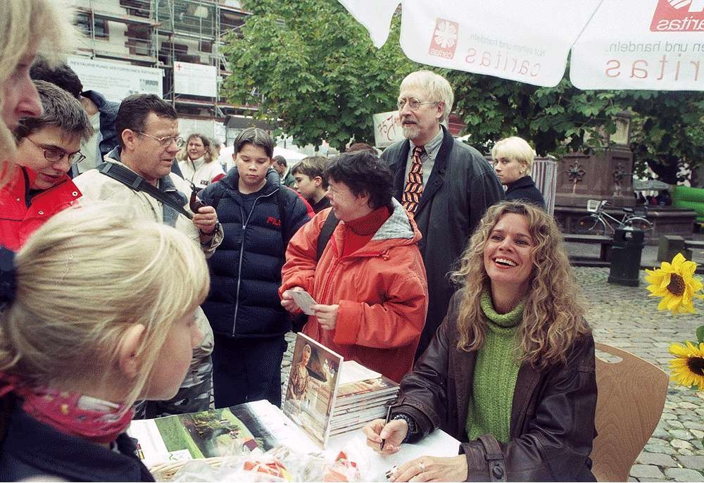 Freiburg im Breisgau: Autogrammstunde von Christiane Bachschmidt auf dem Rathausplatz